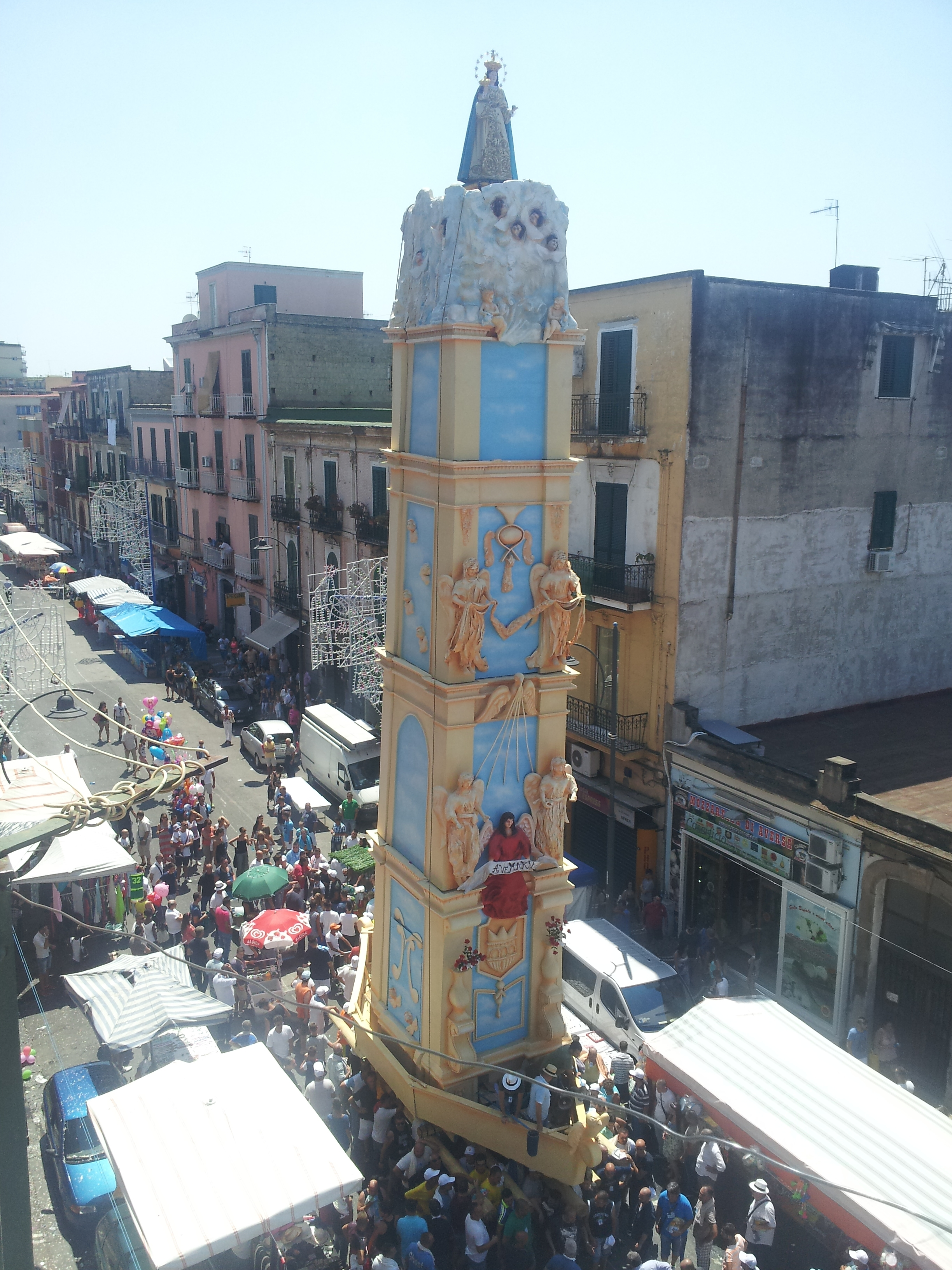 Ogni anno, nel mese di agosto viene alzato questo carro in onore della Madonna di Ponticelli, la Madonna della Neve.